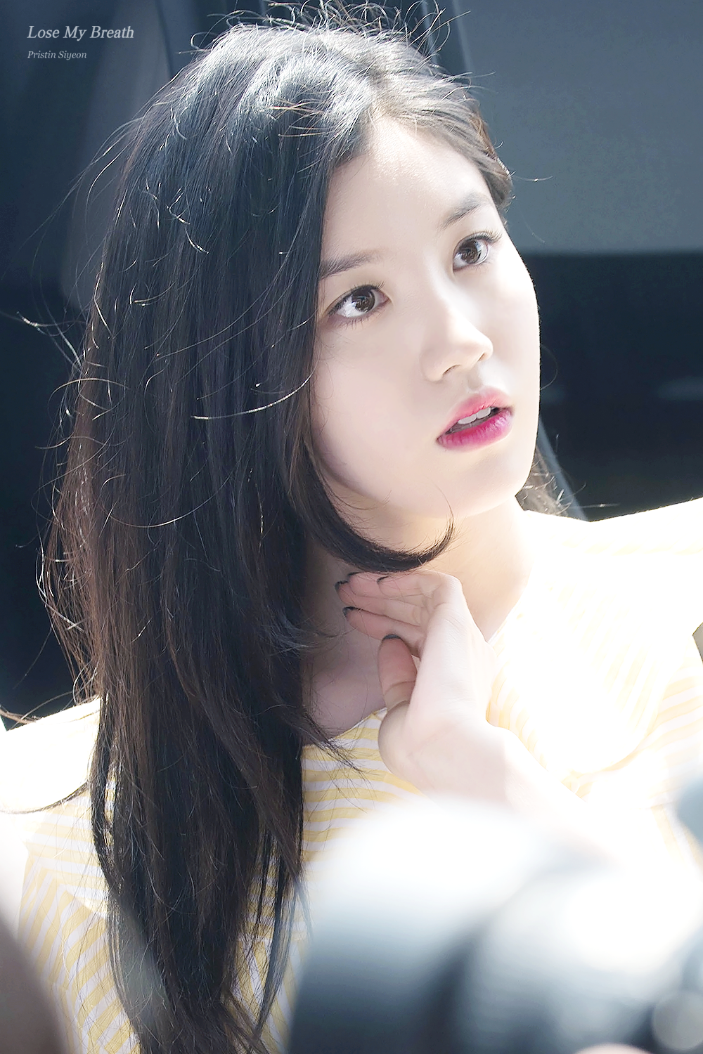 한국어 (조선): 170518 출국 프리스틴 시연 직찍